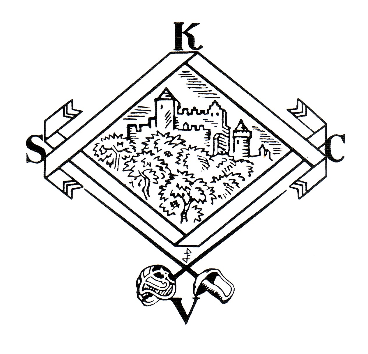 Koesener Raute